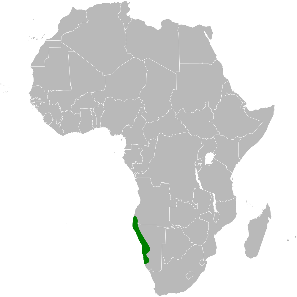 Ammomanopsis grayi distribution map, based on